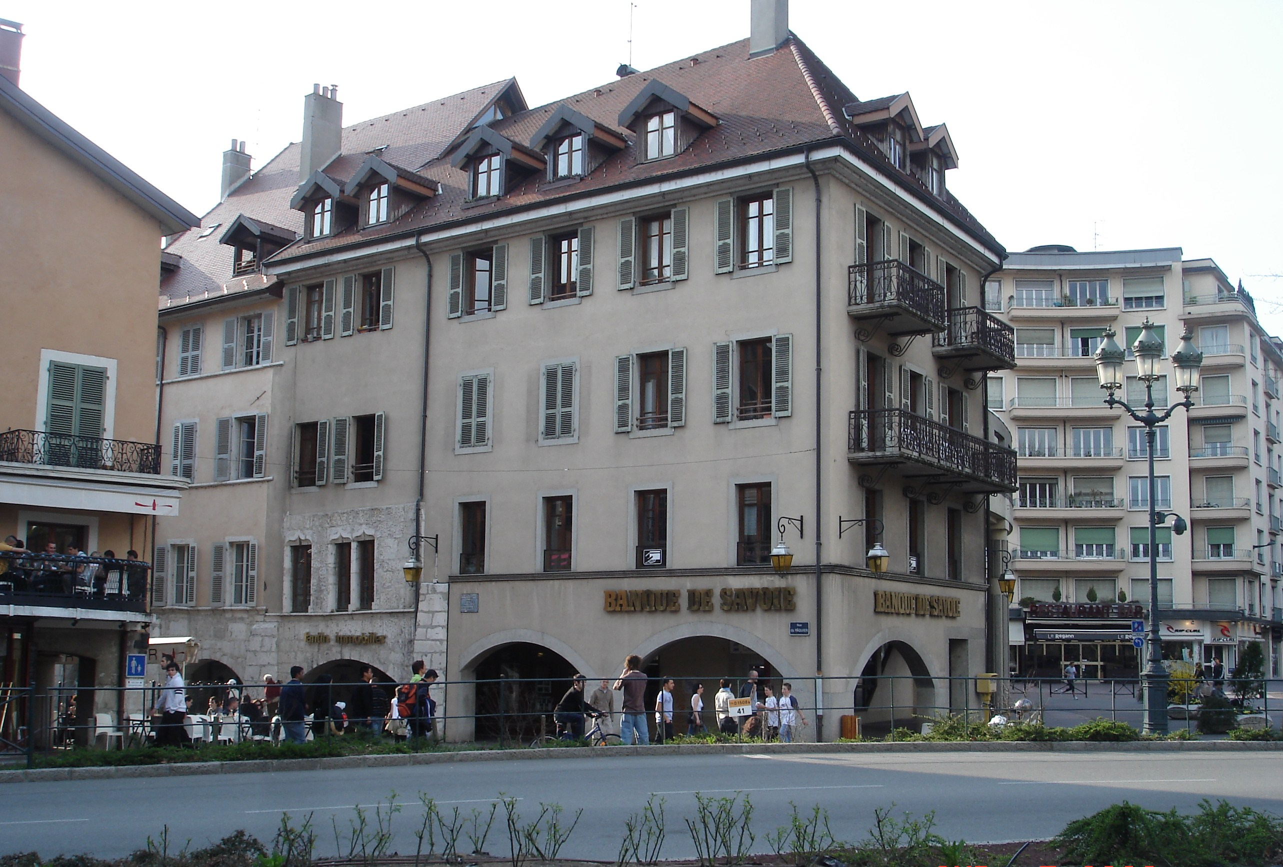 Banque de Savoie (agence) se situant au centre ville d'Annecy (Haute-Savoie) - France